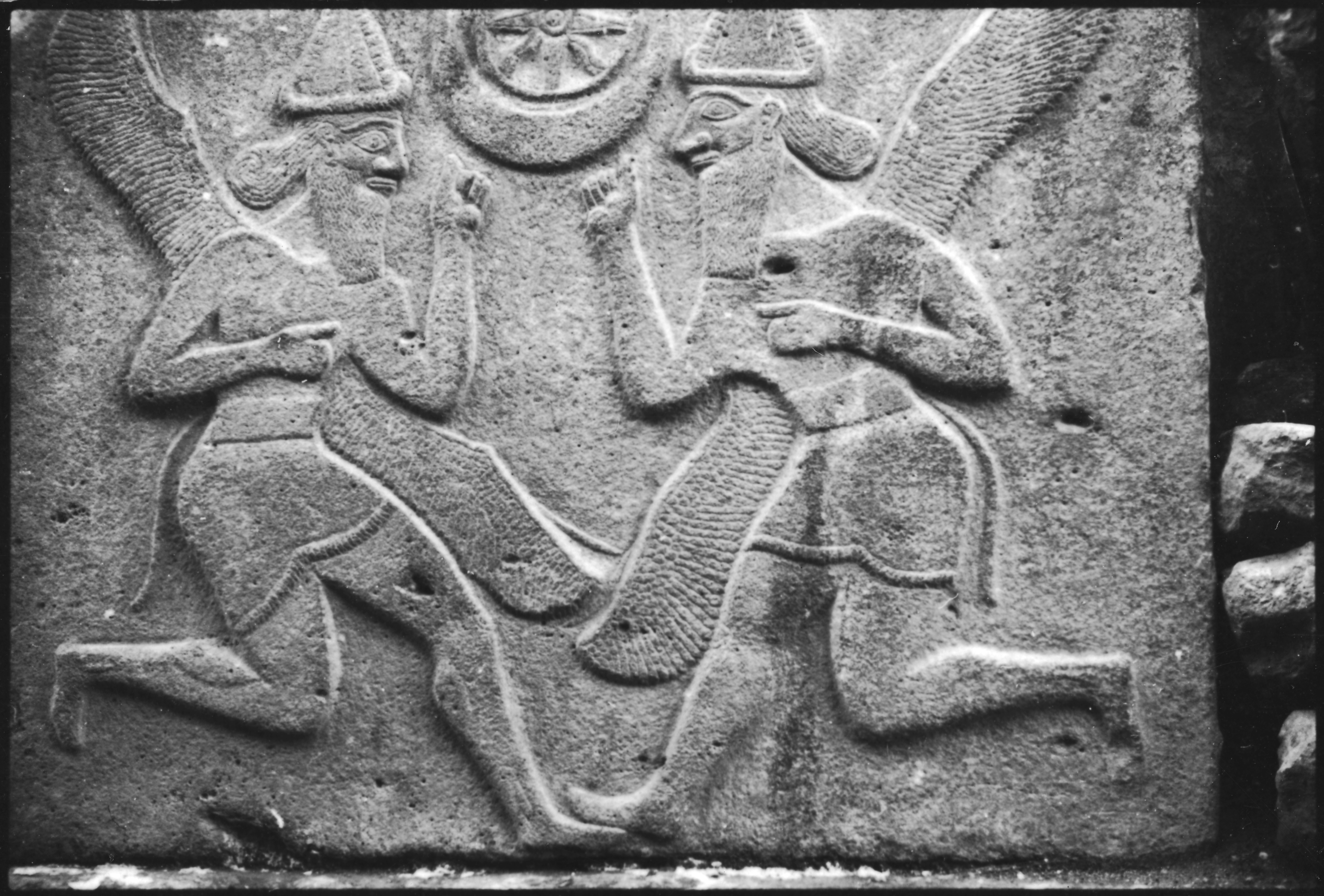 Persien, Persepolis: Ruinen; Detailansicht Relief